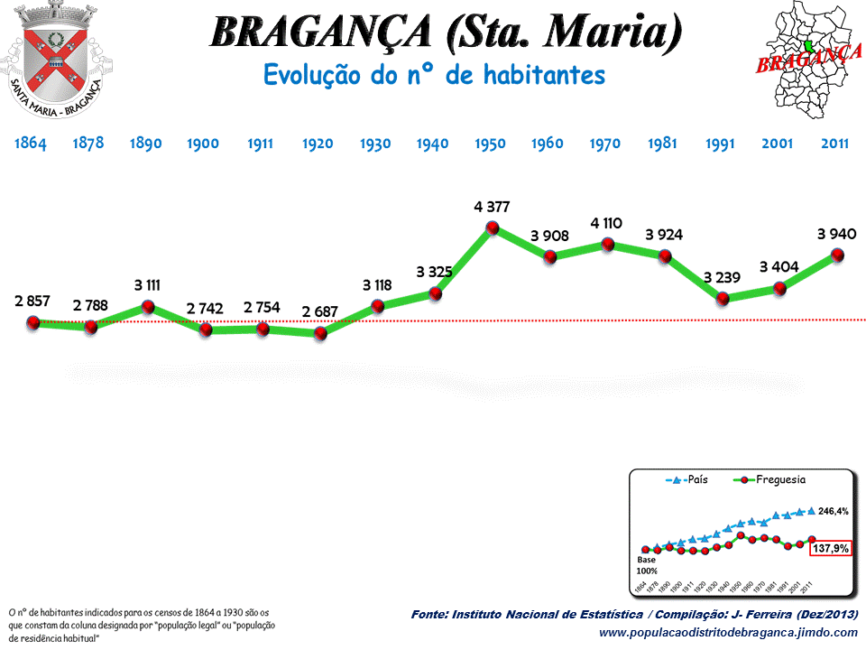 Evolução da População 1864 / 2011